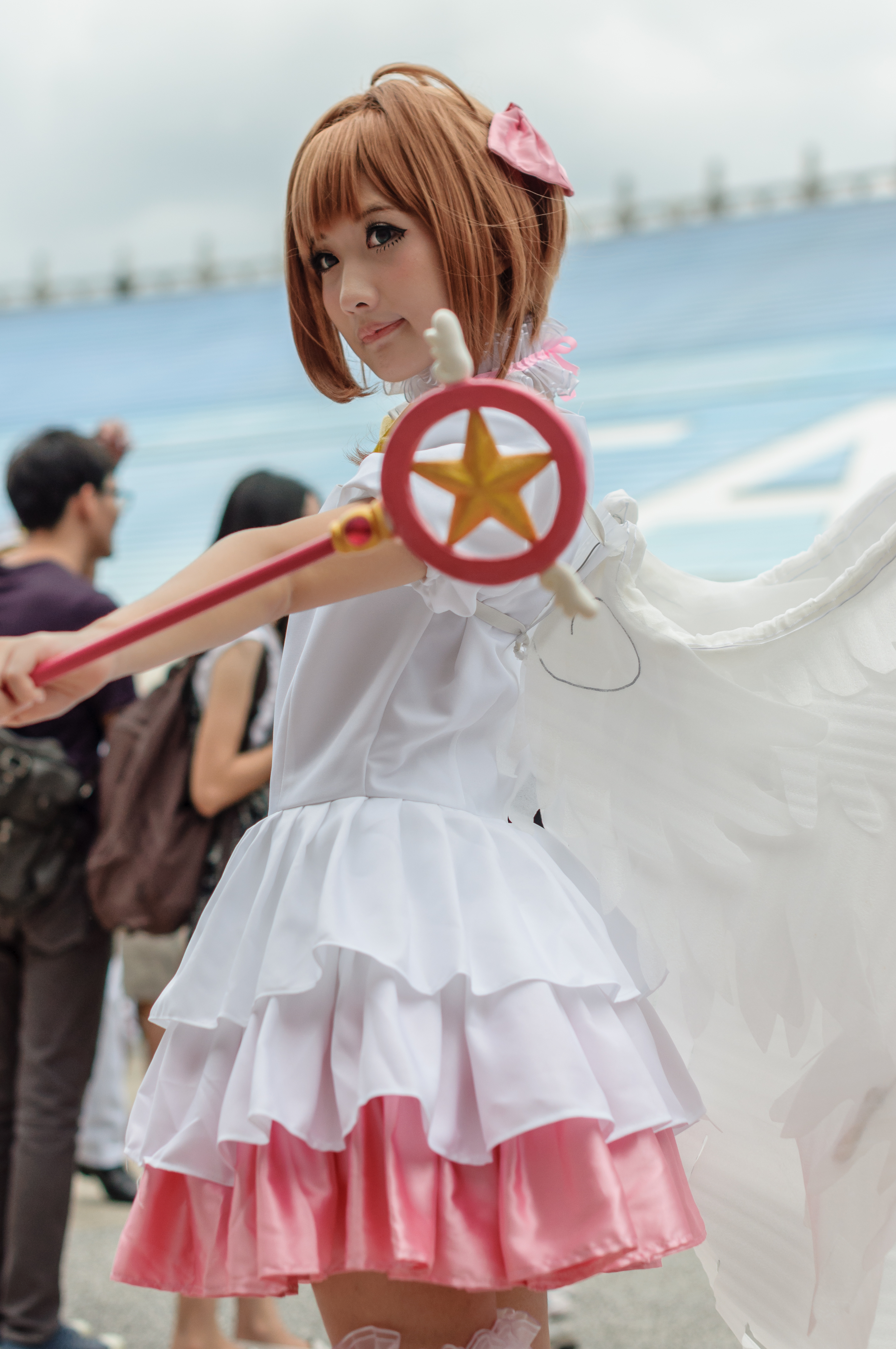 中文（台灣）: 第26屆開拓動漫祭，《庫洛魔法使》木之本櫻cosplayer。